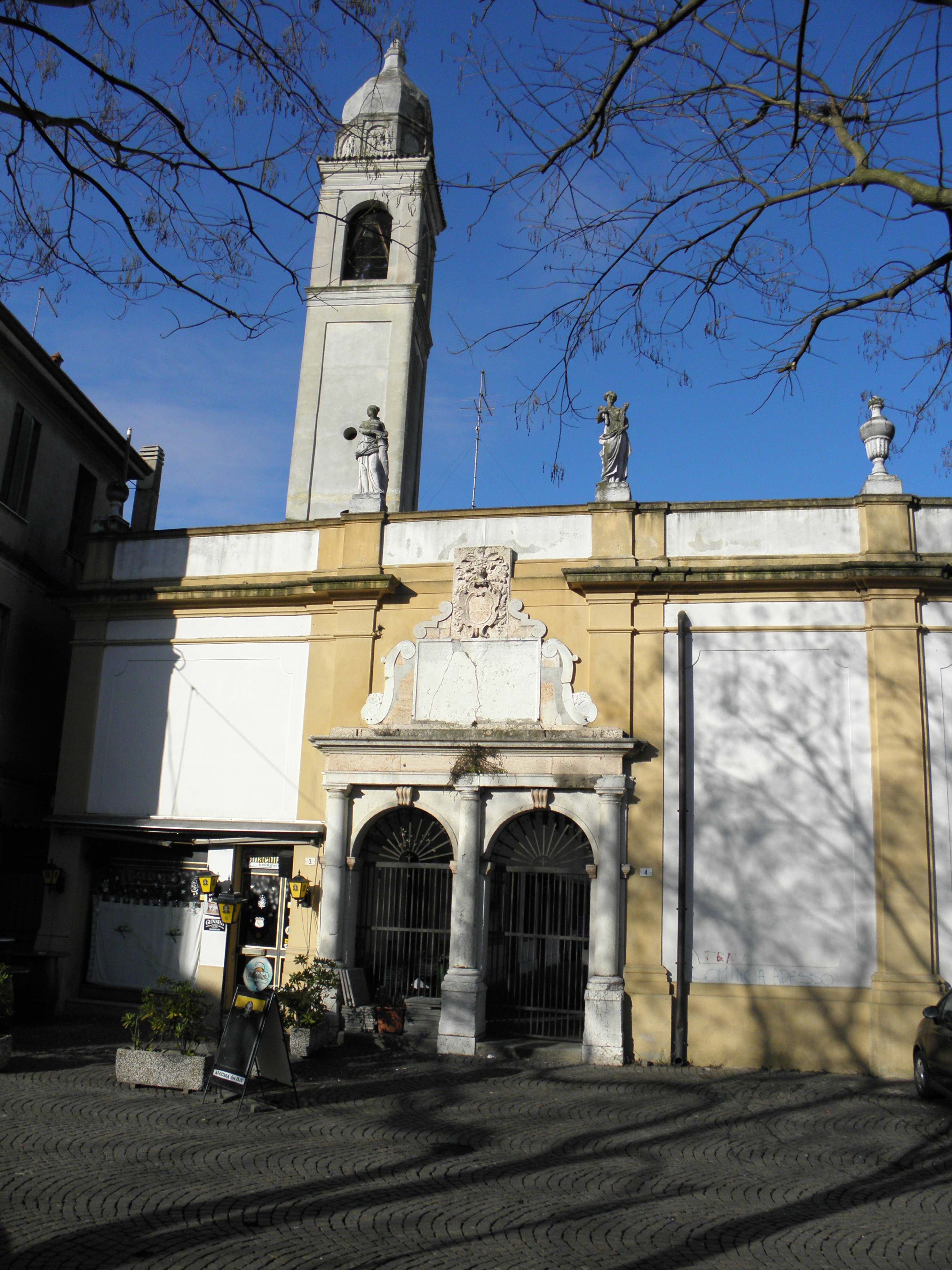 Rovigo, Piazza Annonaria: ingresso da Piazza Umberto Merlin.